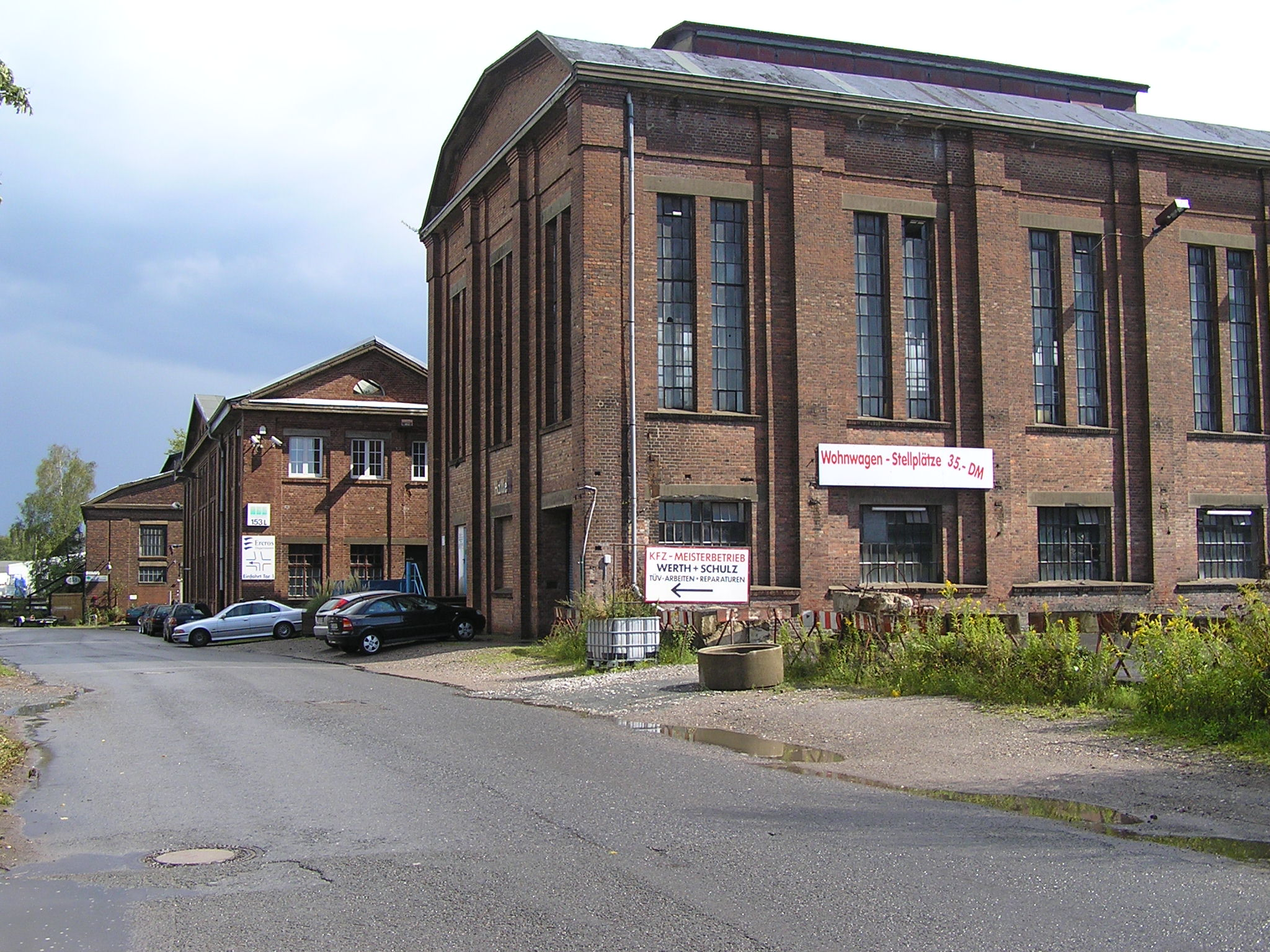 Betriebsgebäude (Kaue und Lampenstube) der Zeche König Ludwig 1/2, Recklinghausen